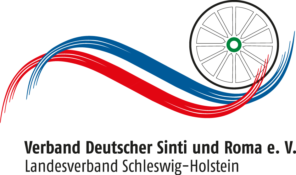 Logo Verband Deutscher Sinti und Roma e. V. - Landesverband Schleswig-Holstein, seit 2011